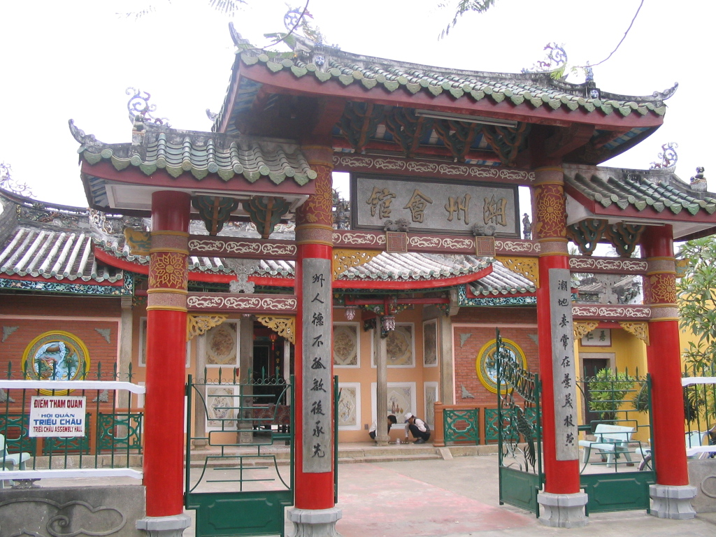 Ngũ Cẩm Minh đẹp trai